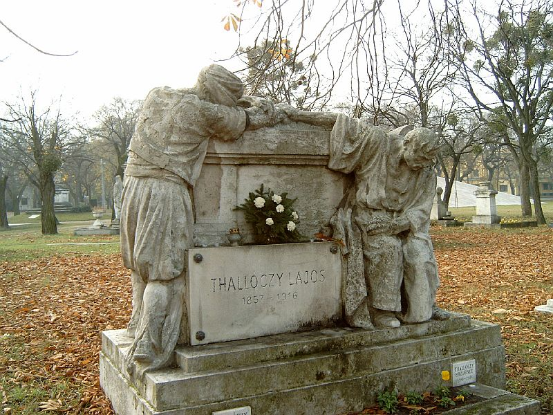 Thallóczy Lajos sírja Budapesten. Kerepesi temető: 10/1-1-14.